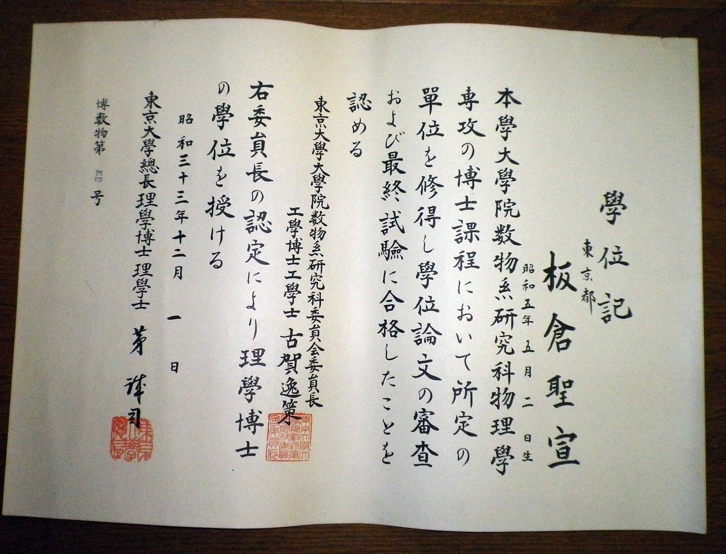 昭和33年（1958年）に東京大学より板倉聖宣に対して発行された，博士号の学位記。